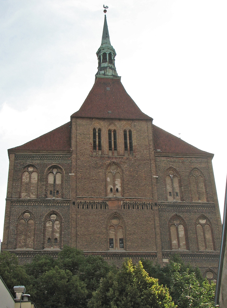 Beschreibung: St. Marien Kirche in Rostock, Germany Fotograf: Darkone, 17. August 2005